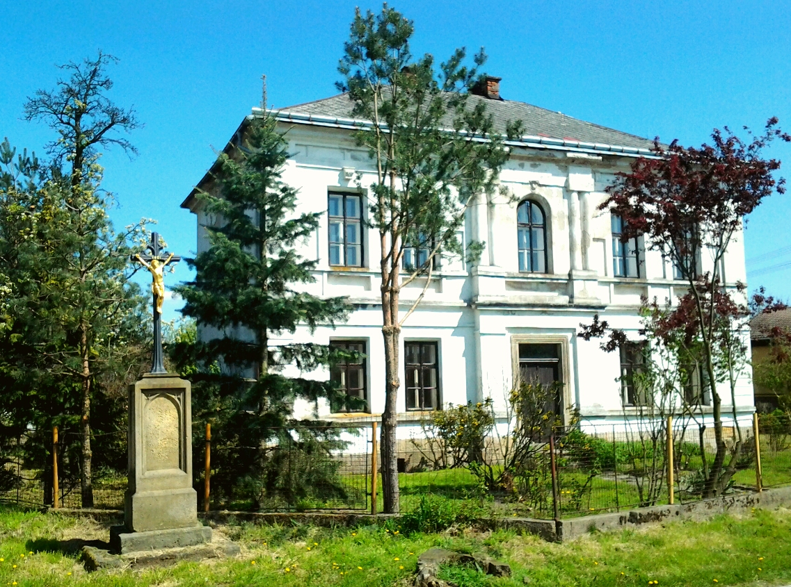 Zámeček Staré Ždánice s křížkem